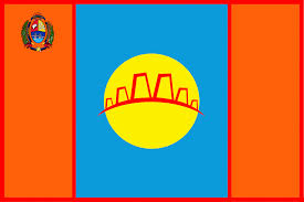 Bandera de la Ciudad de San Francisco